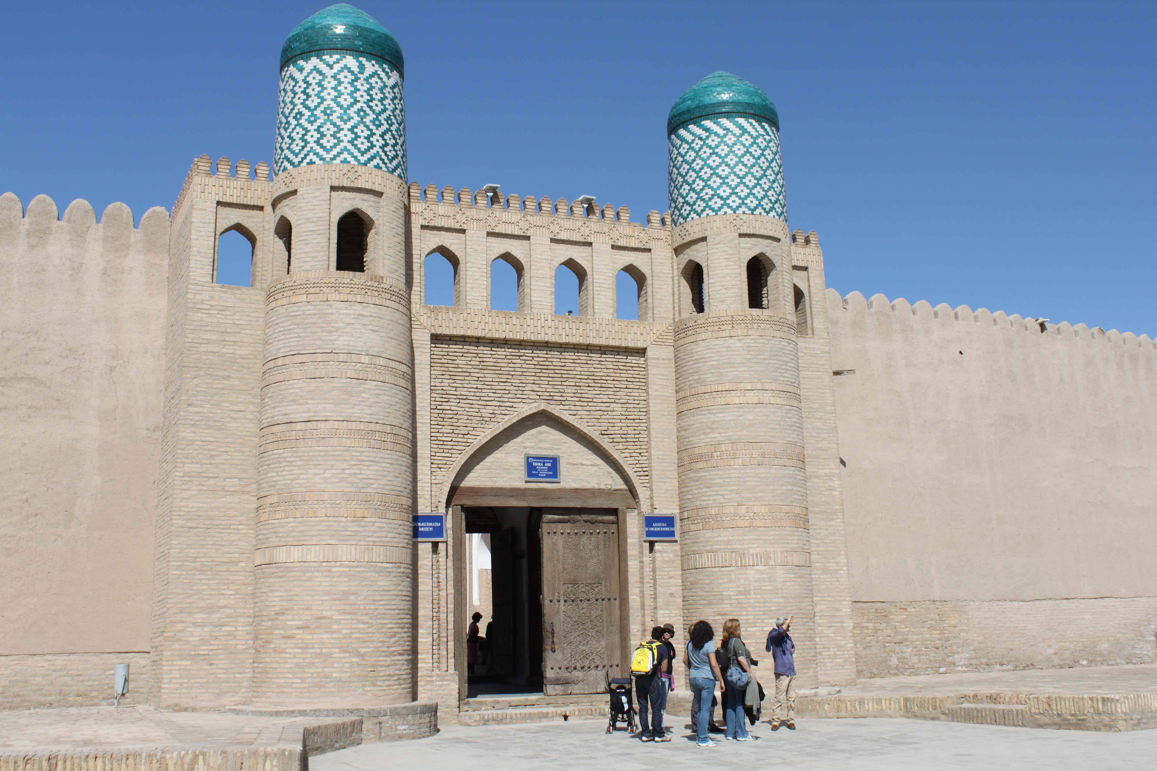 Porte d'accès de Kunya Ark